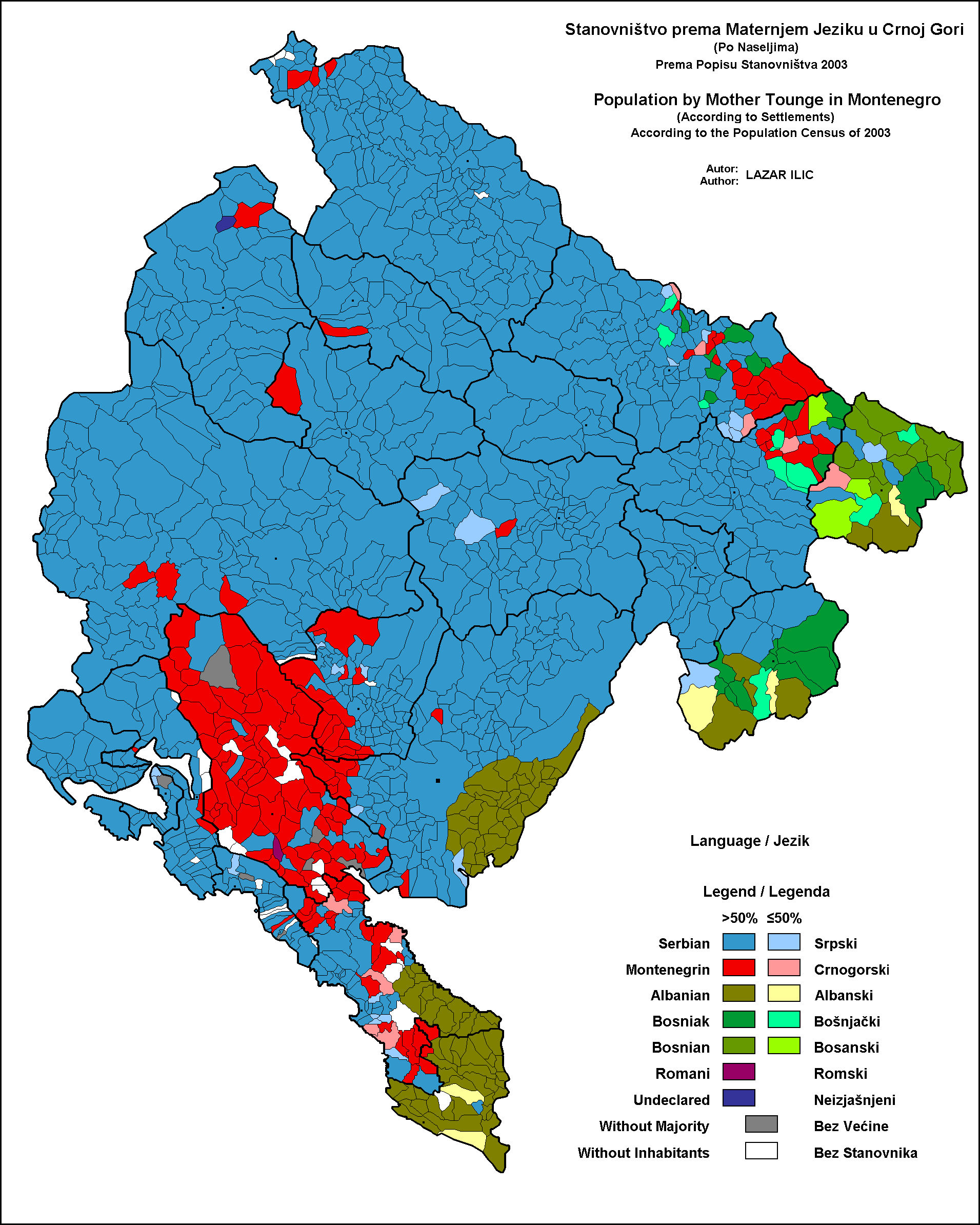 Karta jezika u crnoj gori prema popisu stanovnistva iz 2003e godine. Ako imate pitanja u vezi karte mozete kontaktirati Lazara Ilica na